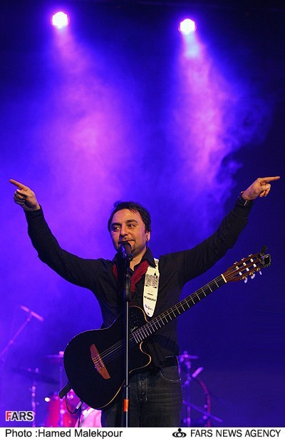 کنسرت گروه آریان